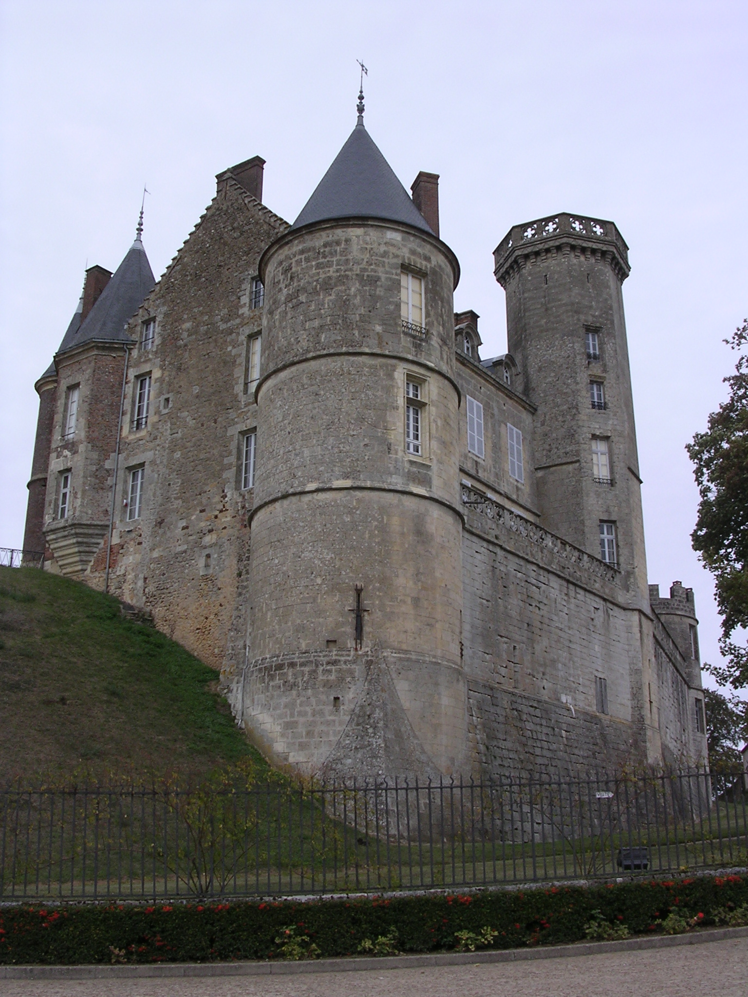 Chateau de Montmirail Sarthe